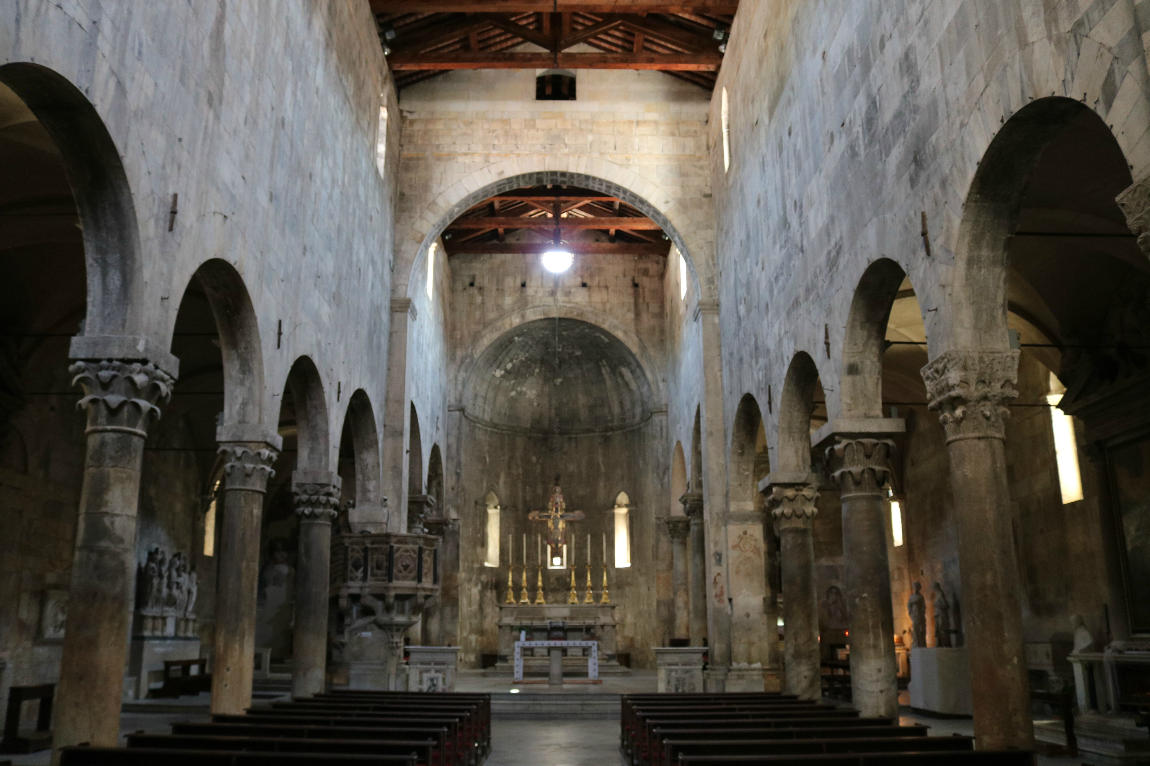 Interno del Duomo di Carrara